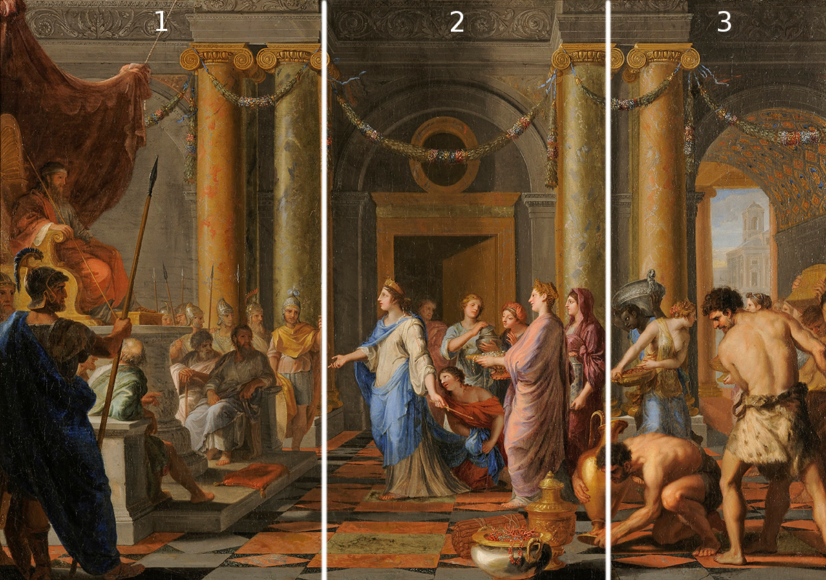 oil on canvasmedium QS:P186,Q296955;P186,Q12321255,P518,Q861259